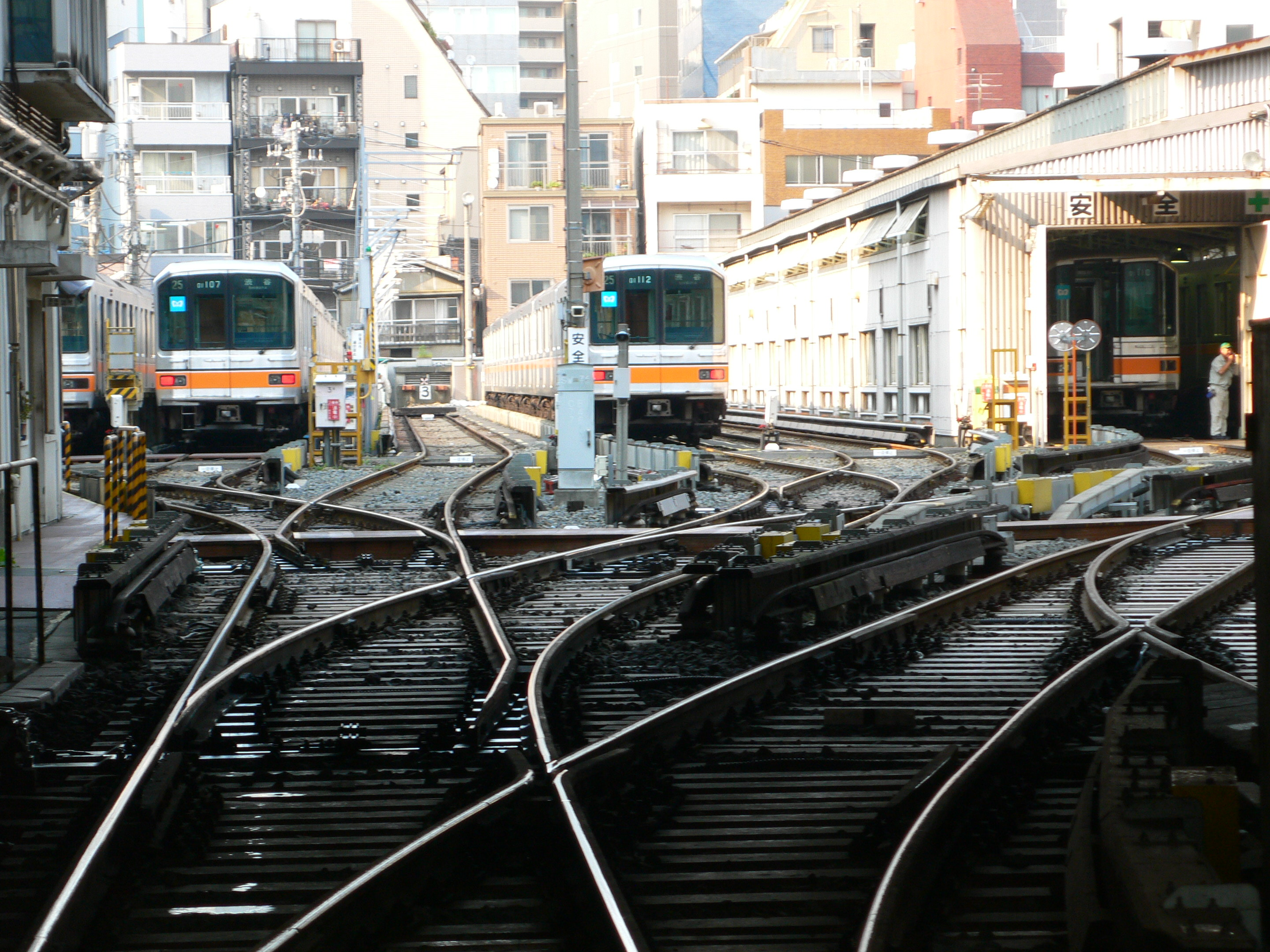 上野検車区の様子